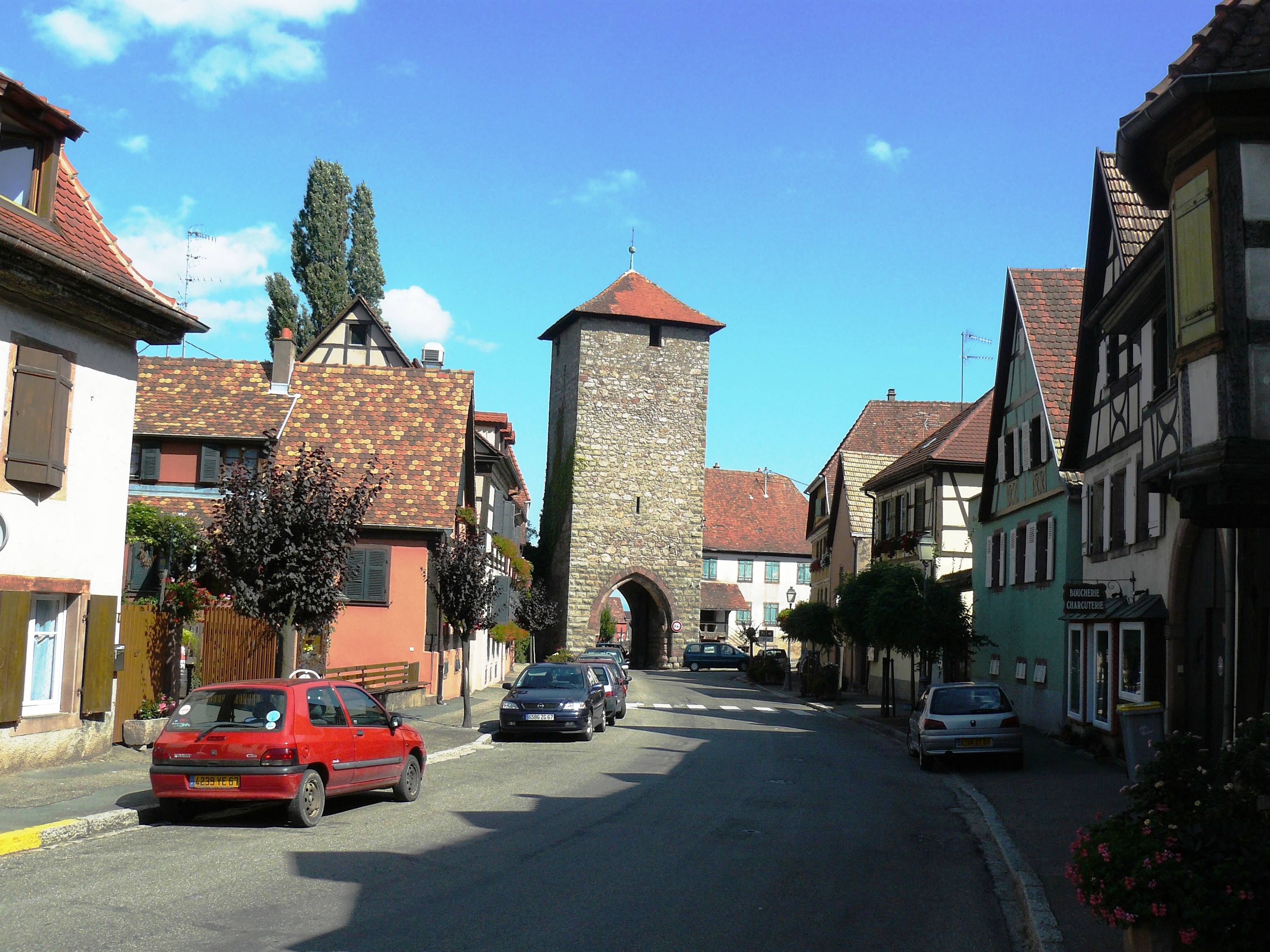 Tour et porte de Blienschwiller en sortant de Dambach-la-Ville